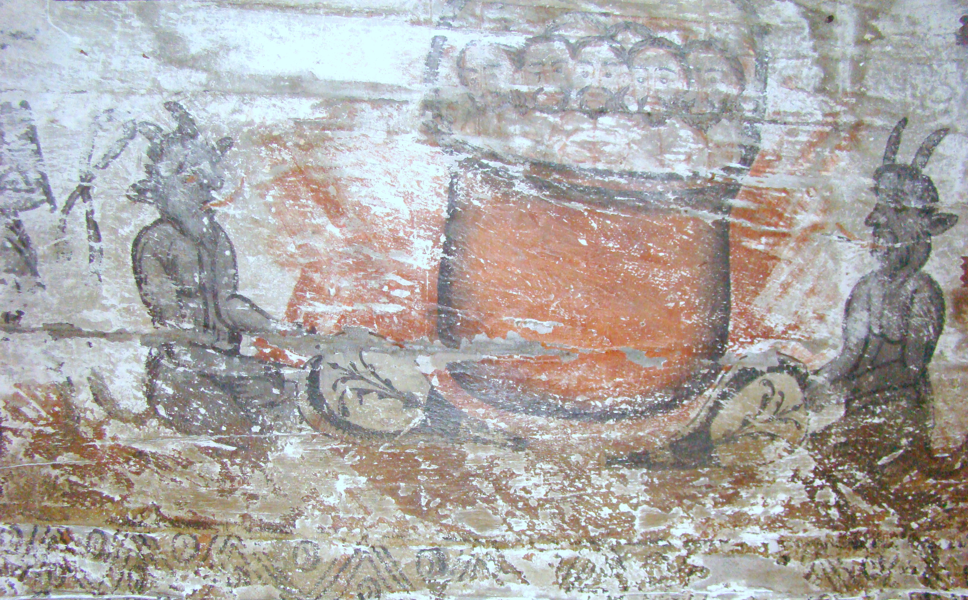 Biserica de lemn "Sfinții Arhangheli Mihail şi Gavriil" din Chieșd, județul Sălaj